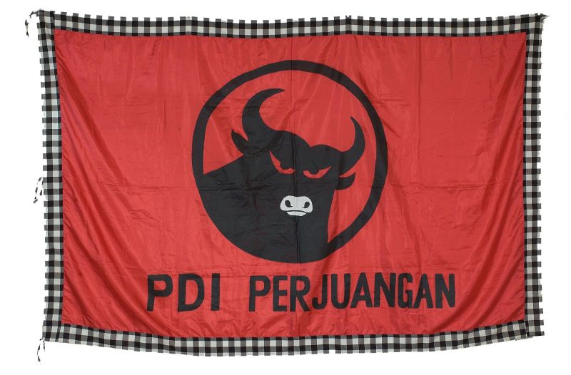 Vlag. Een rode vlag met in het midden een cirkel waarin de kop van een buffel, daar onder staan de letters PDI Perjuangan gedrukt, het rode vlak is rondom afgewerkt met een zwart/wit geblokte rand, aan de binnenrand zijn (boven, midden en onder) bandjes vastgemaakt, waarmee men de vlag aan een stok kan vastmaken. PDI-P staat voor Partai Demokrasi Indonesia-Perjuangan, dit betekent Indonesische Demokratische Partij - strijd (of gevecht). Het is de partij geleid door Megawati Sukarnoputri. Er was al een oude PDI partij (deze bestaat nog steeds, maar met heel weinig macht) Megawati heeft er de PDI-P van gemaakt, en er het woord Perjungan (strijd) aan toegevoegd, om aan te geven dat zij de problemen van het oude, vroegere regime in Indonesie wil overwinnen.. Vlag van de Partai Demokrasi Indonesia Perjuangan